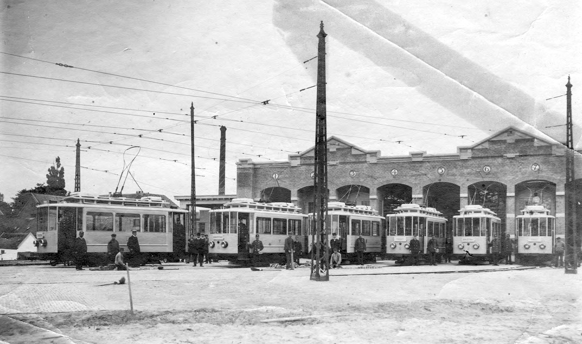 Gemeentevervoerbedrijf: Tramremise aan de Westervoortsedijk, de heer met de strohoed is directeur Nieuwenhuizen